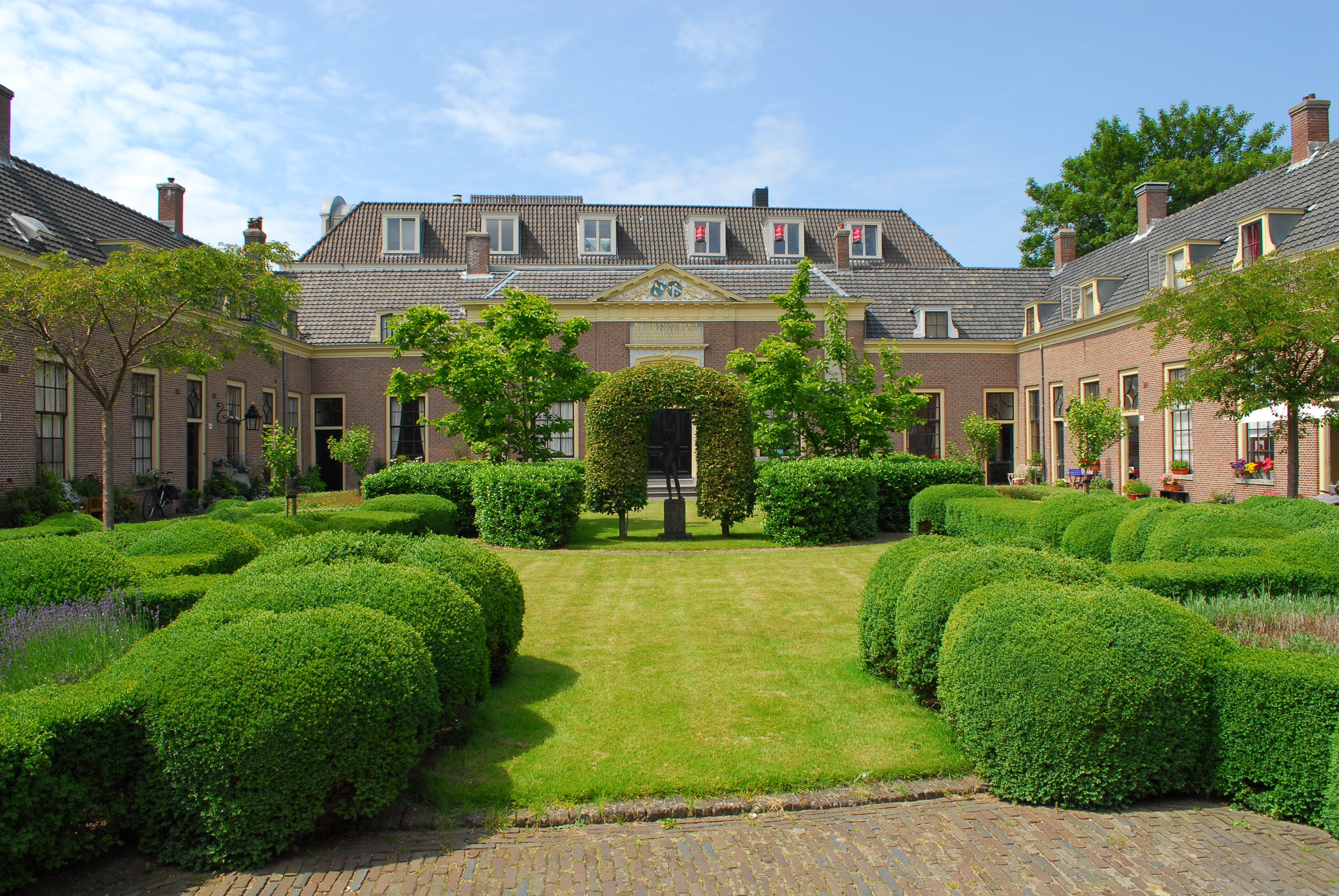 Hofje van Oorschot aan de Kruisstraat 44 in Haarlem